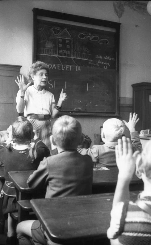 ADN-ZB/ Kümpfel Berlin 1949: "Tag der offenen Türen" Anläßlich der Volksbildungswoche fand in den Berliner Schulen ein Tag der offenen Schultür statt. Die Bevölkerung, vor allem die Eltern, hatten Gelegenheit dem Unterricht beizuwohnen. -In der 14. Volksschule in der Prenzlauer Allee. Die Schulanfängerklasse von Fräulein Häuer. UBz: 5+1=6. Wer weiß es? 4050-49